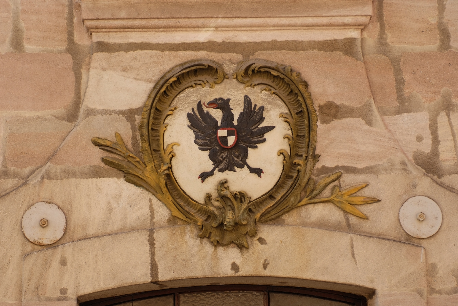 Fürth, Bavaria, Germany